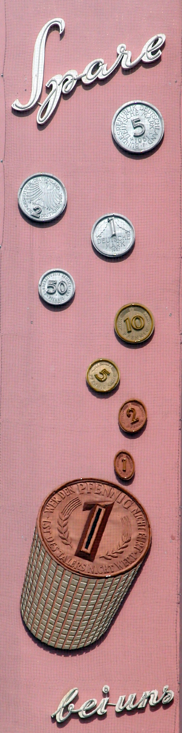 Braunschweig: Alte Werbung der Deutschen Bank aus den 1950er Jahren an einem Gebäude auf dem Bohlweg.